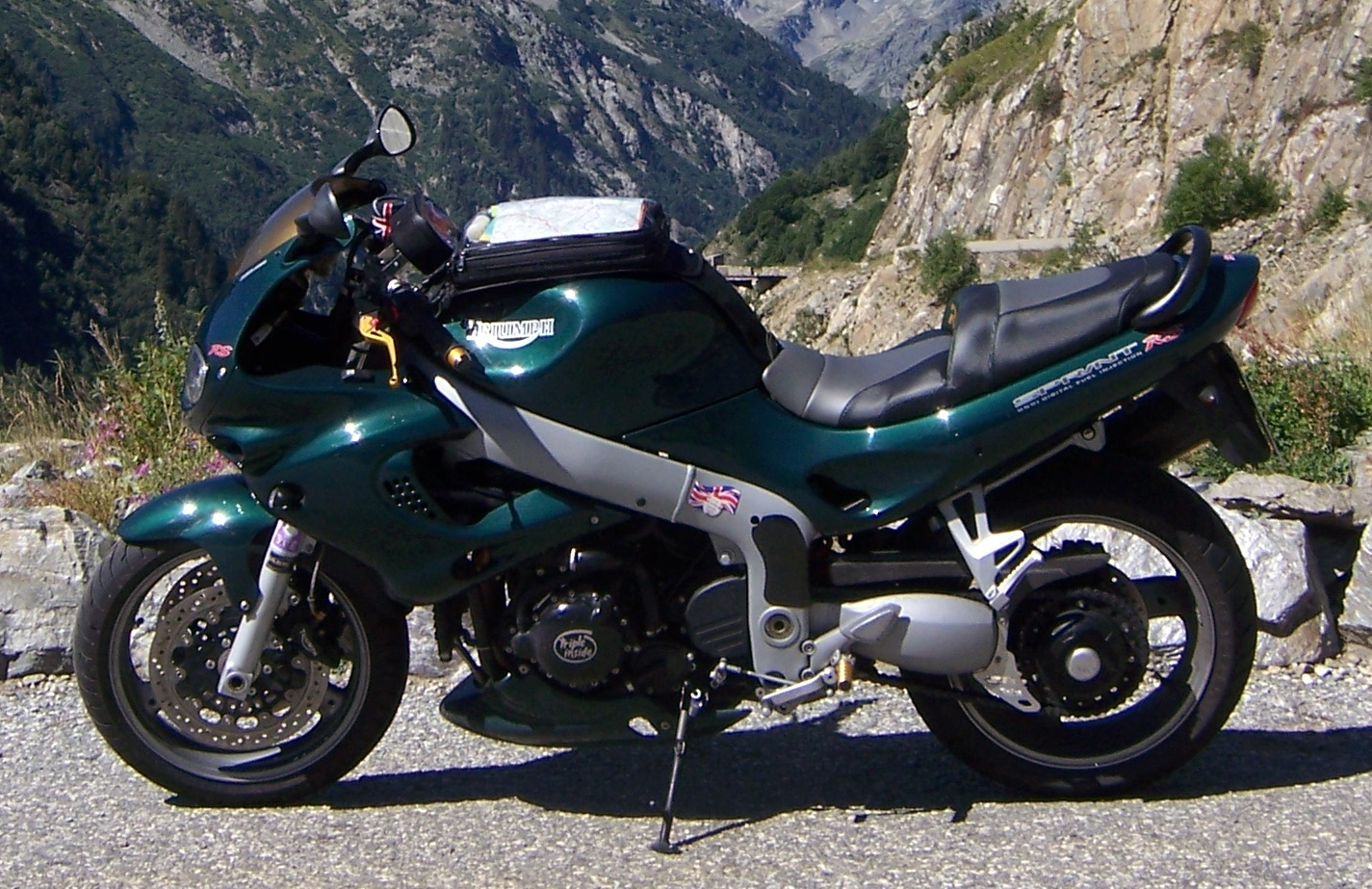 Bild einer Triumph Sprint 955i RS Last Edition Baujahr 2004